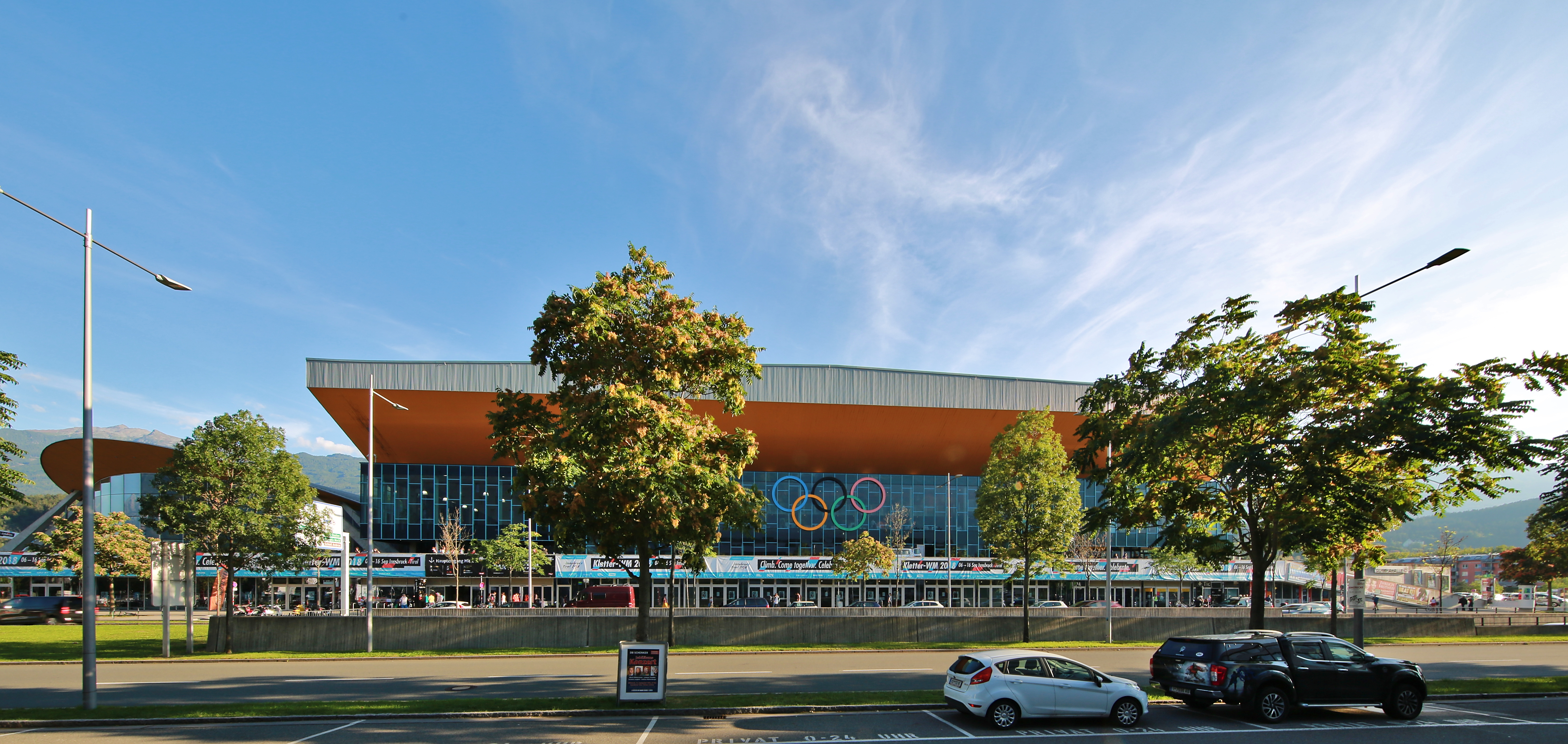 Olympiahalle Innsbruck während der Kletterweltmeisterschaften 2018